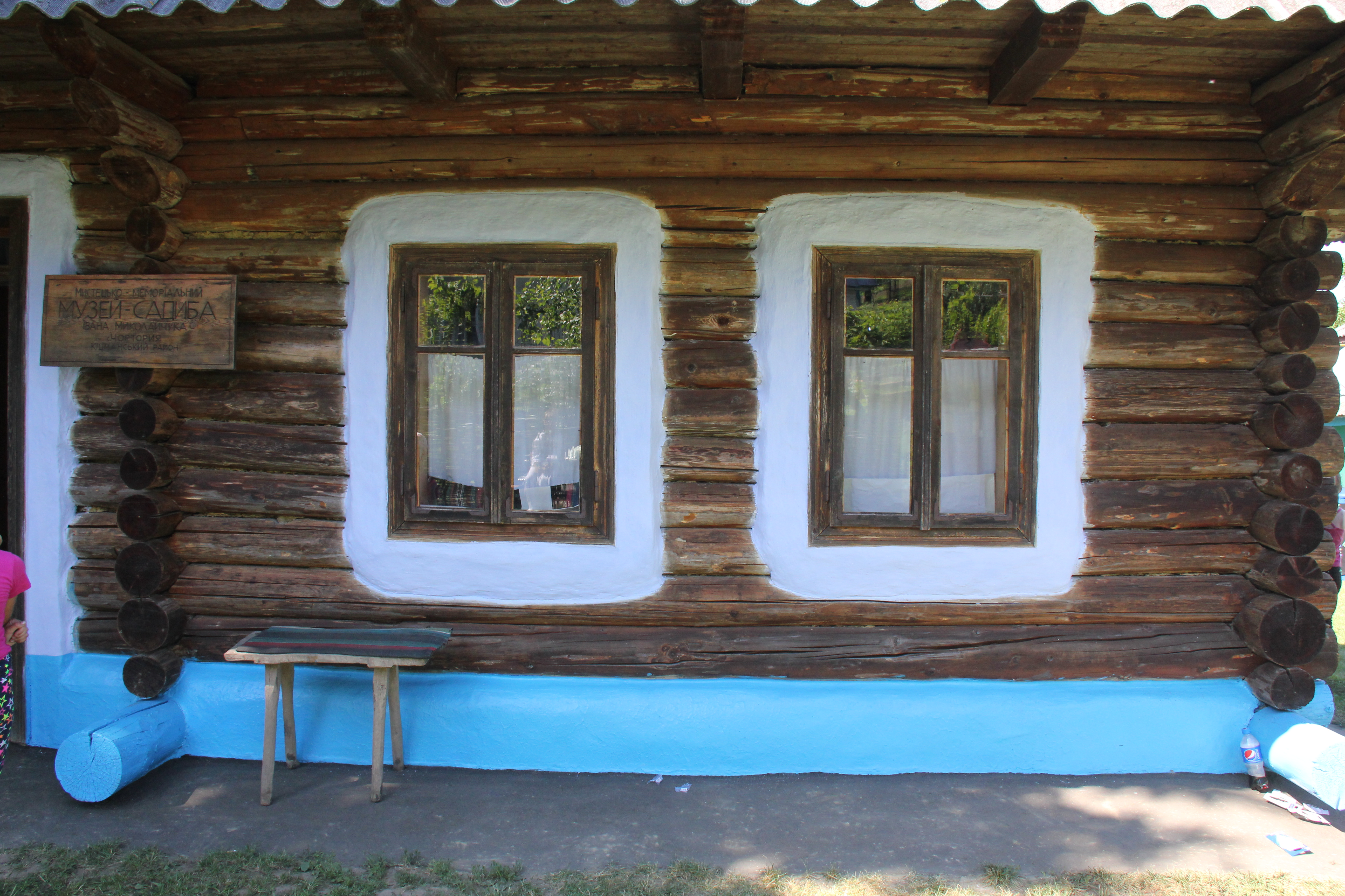 Хата-музей Івана Миколайчука у селі Чотория.